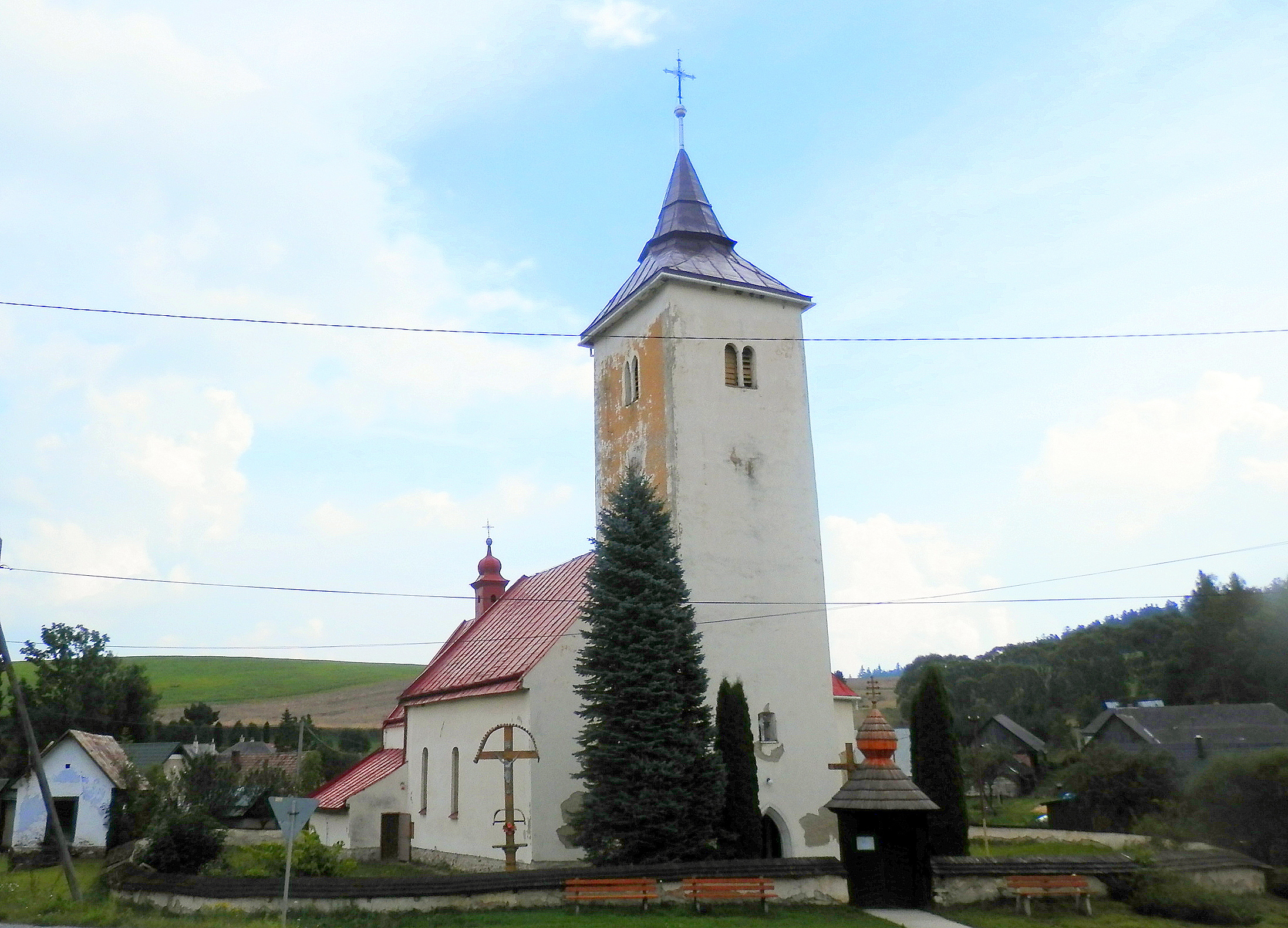 Rímskokatolícky kostol svätej Kataríny Alexandrijskej. Pôvodne gotický kostol, pochádzajúci zo 14. storočia. Obec Vyšné Repaše, okres Levoča. Múr ohradný pri kostole